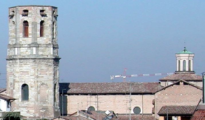 Reggio Emilia Italy San Prospero author:Paolo da Reggio